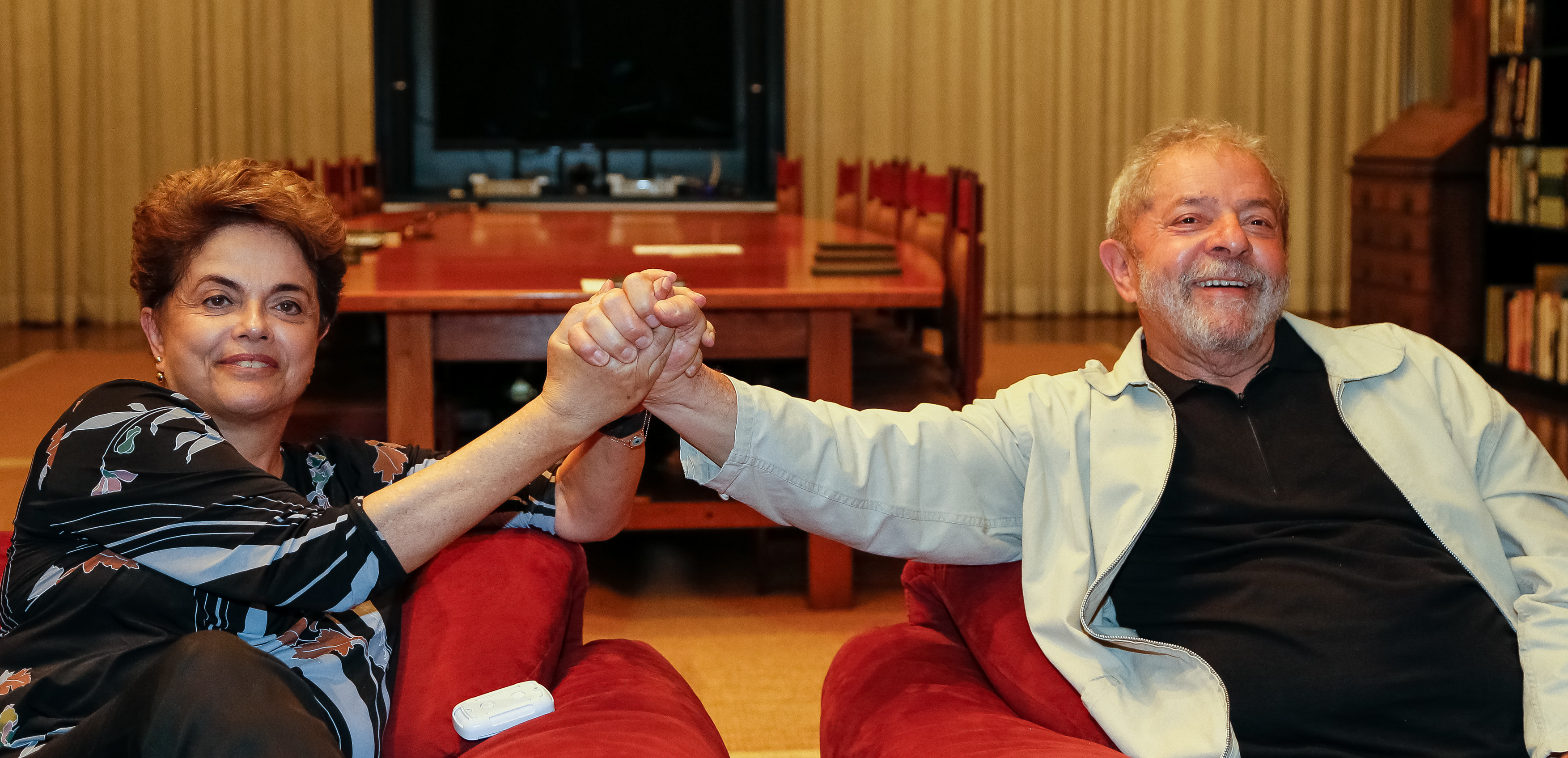 Presidenta Dilma Rousseff recebe o ex-presidente Lula no Palácio da Alvorada. (Brasília - DF, 28/08/2016) Foto: Roberto Stuckert Filho/PR